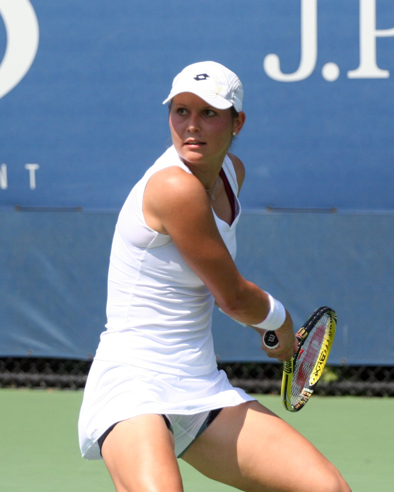 U.S. Open Sept. 2, 2010